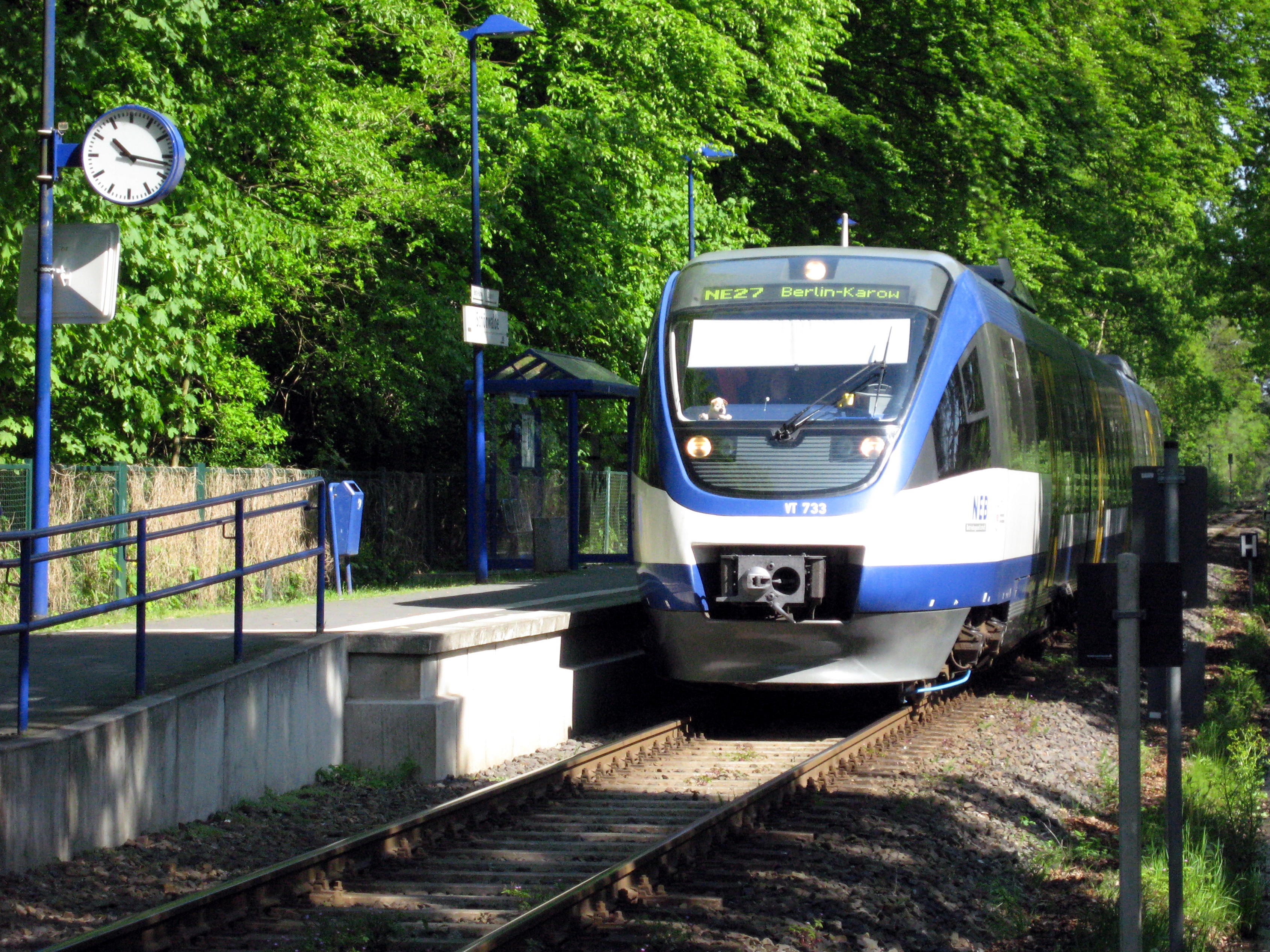 Haltepunkt der NEB in Schönwalde (Barnim), Land Brandenburg, Deutschland